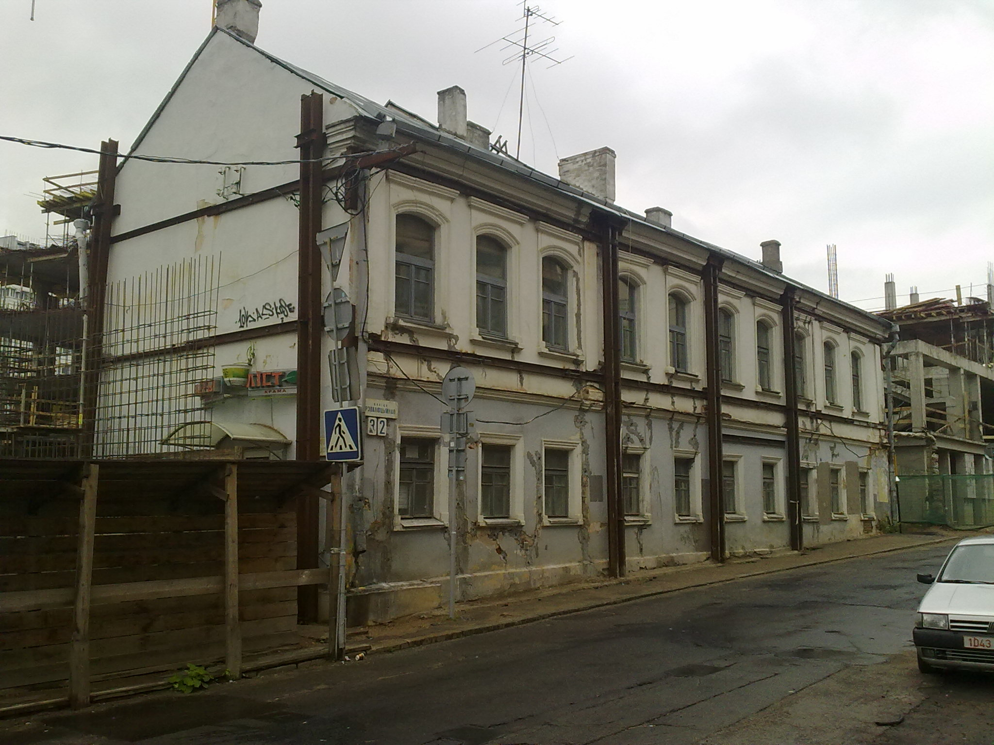 Мінск. вуліца Рэвалюцыйная. 2012